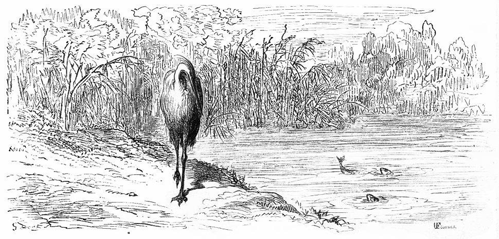 grafika z książki PL Bajki, Jean de La Fontaine, nakładem i drukiem Jana Noskowskiego, Warszawa 1876